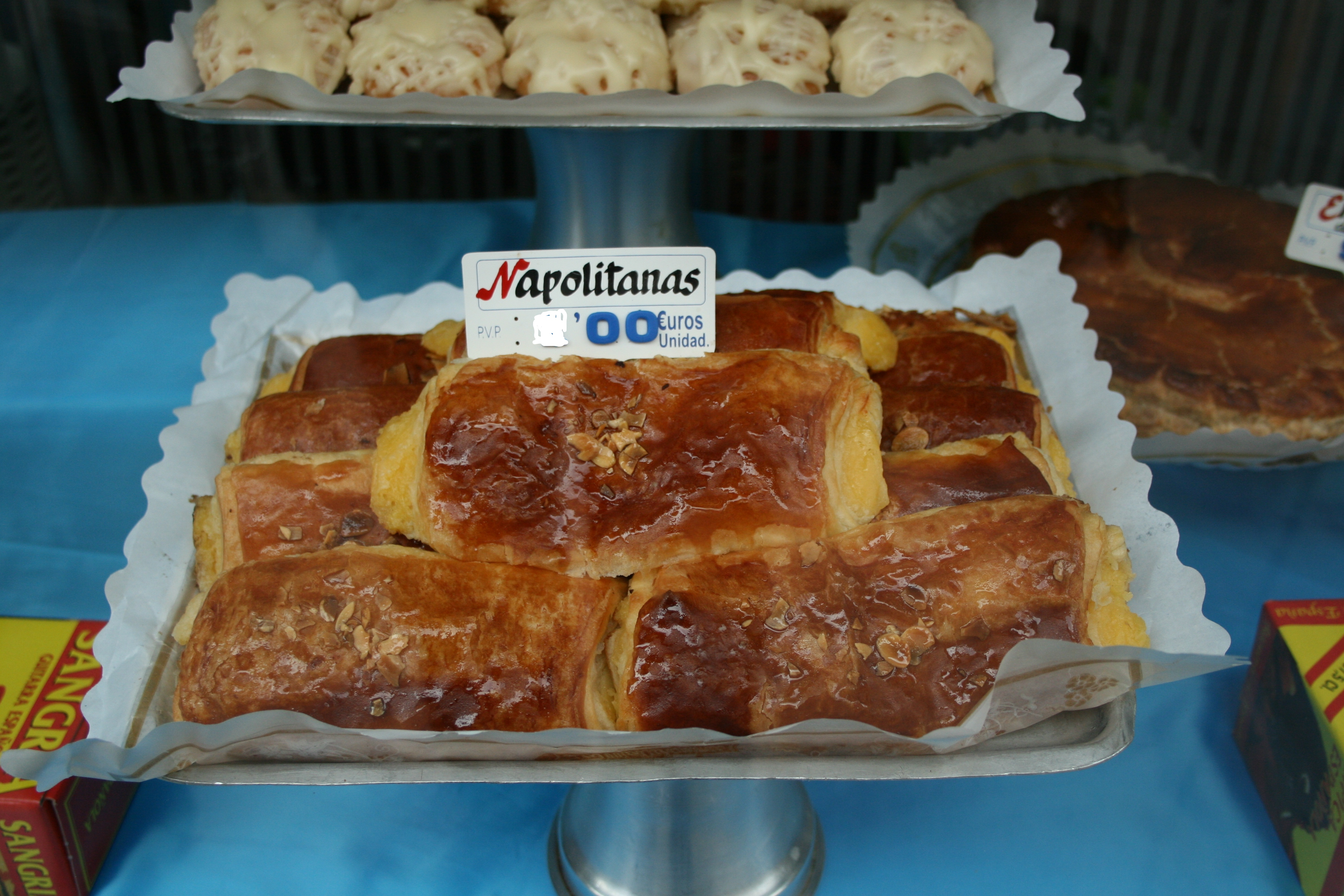 Napolitana